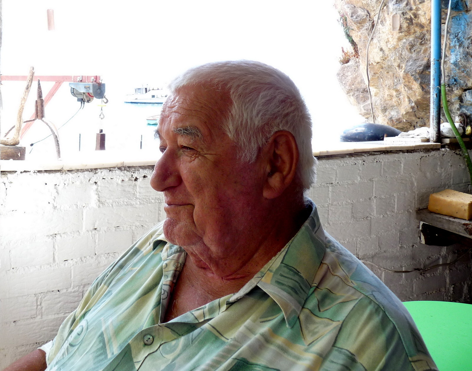 Dragi Stefanija, makedonist